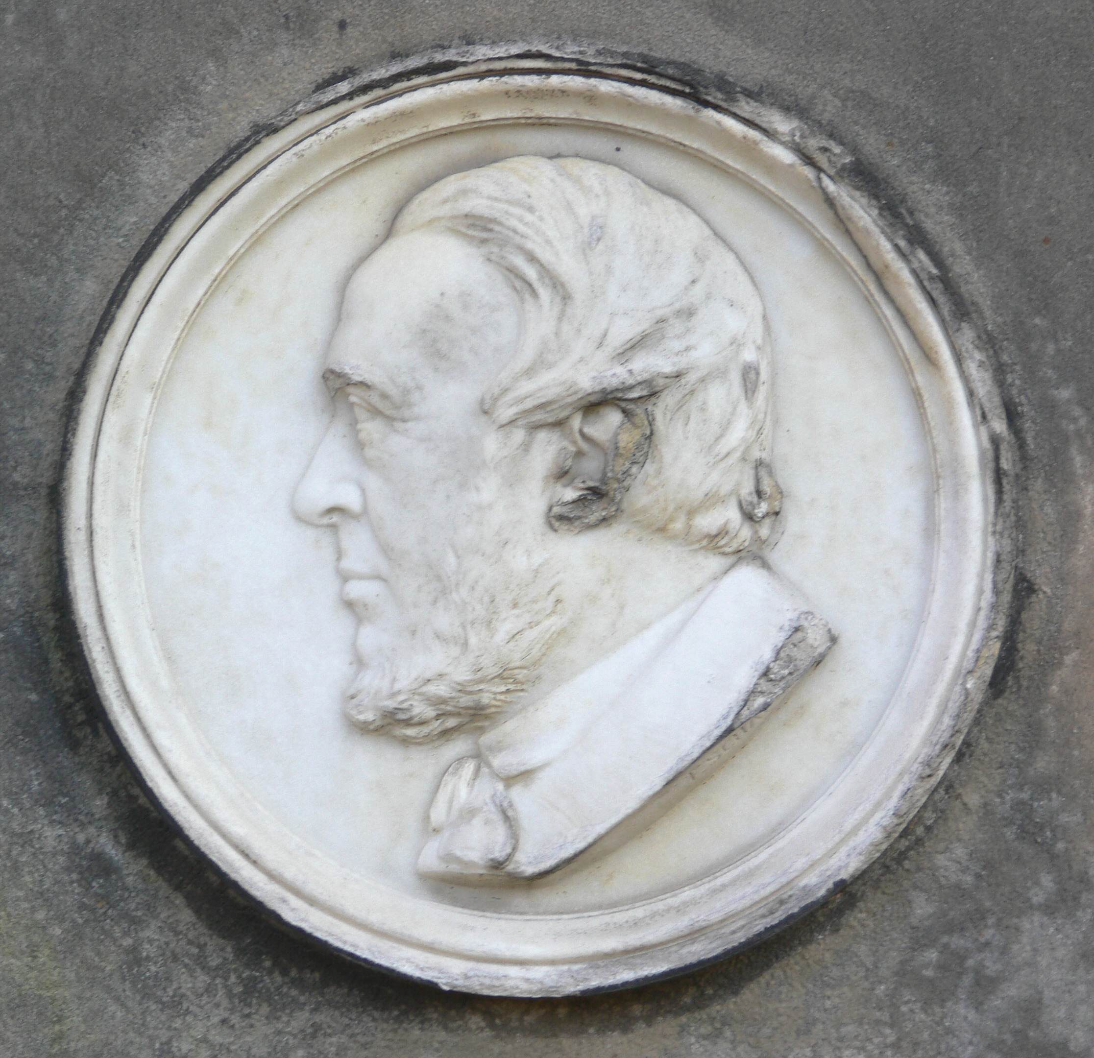 Alter St.-Matthäus-Kirchhof Berlin-Schöneberg Grabstätte von Sybel: Medaillon Heinrich von Sybel